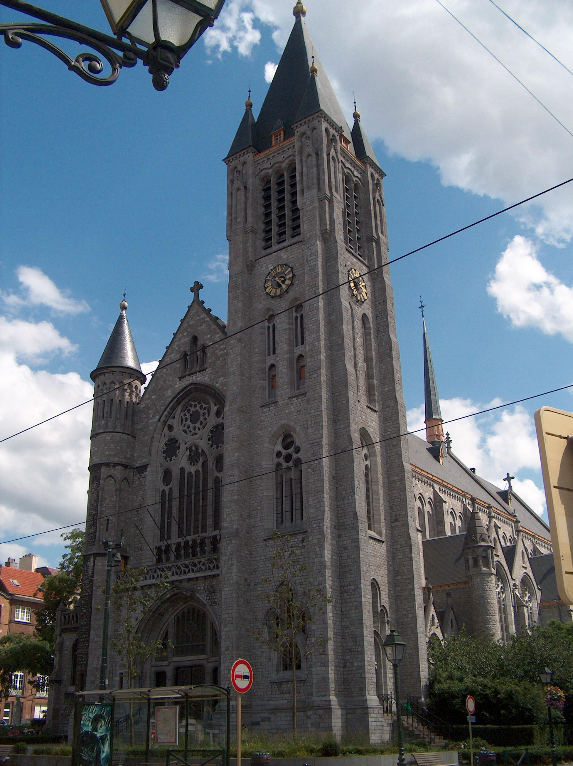 Église Saint-Antoine à Etterbeek, Bruxelles, Belgique.